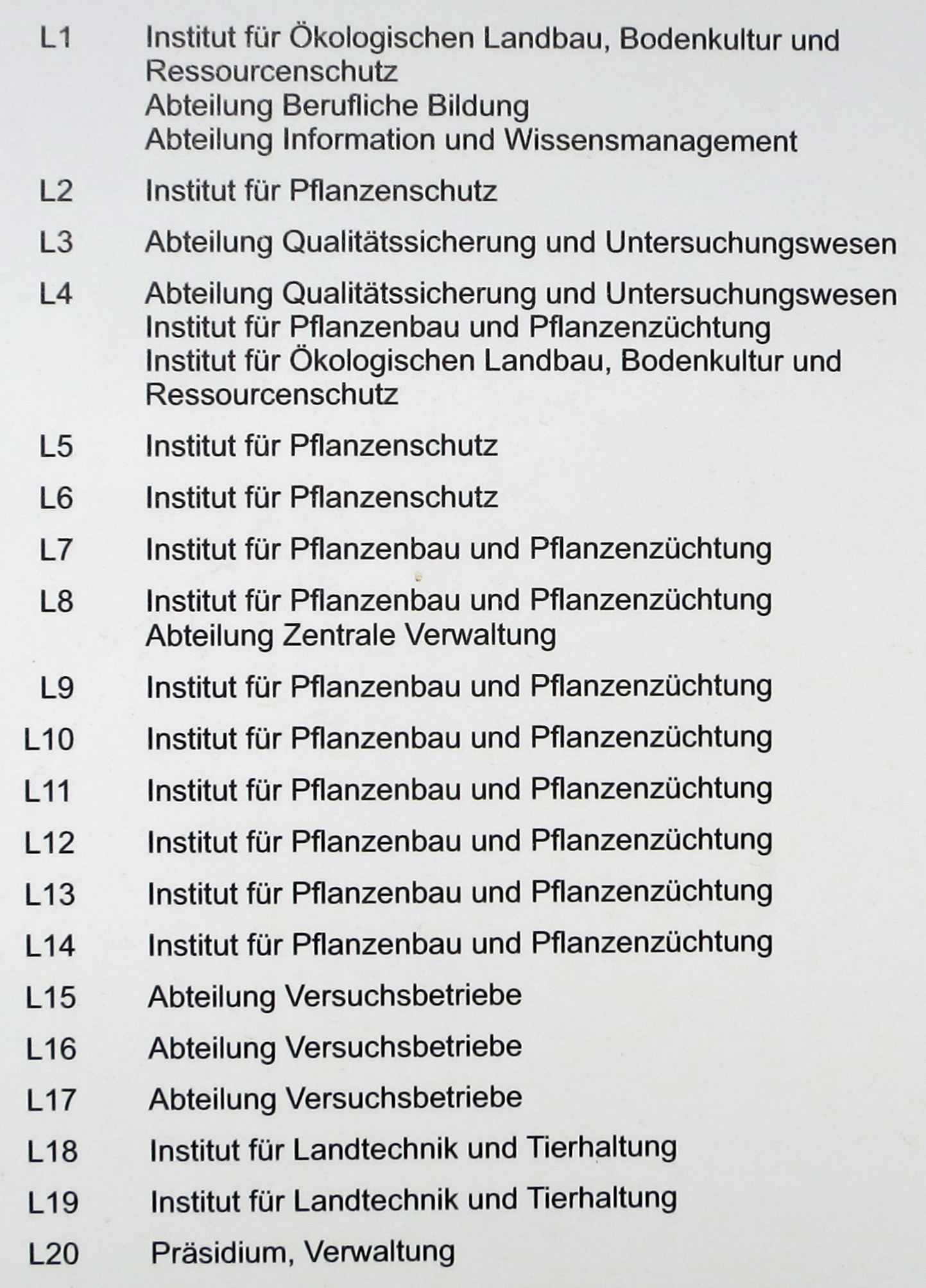 Orientierungstafel LfL Beschriftung